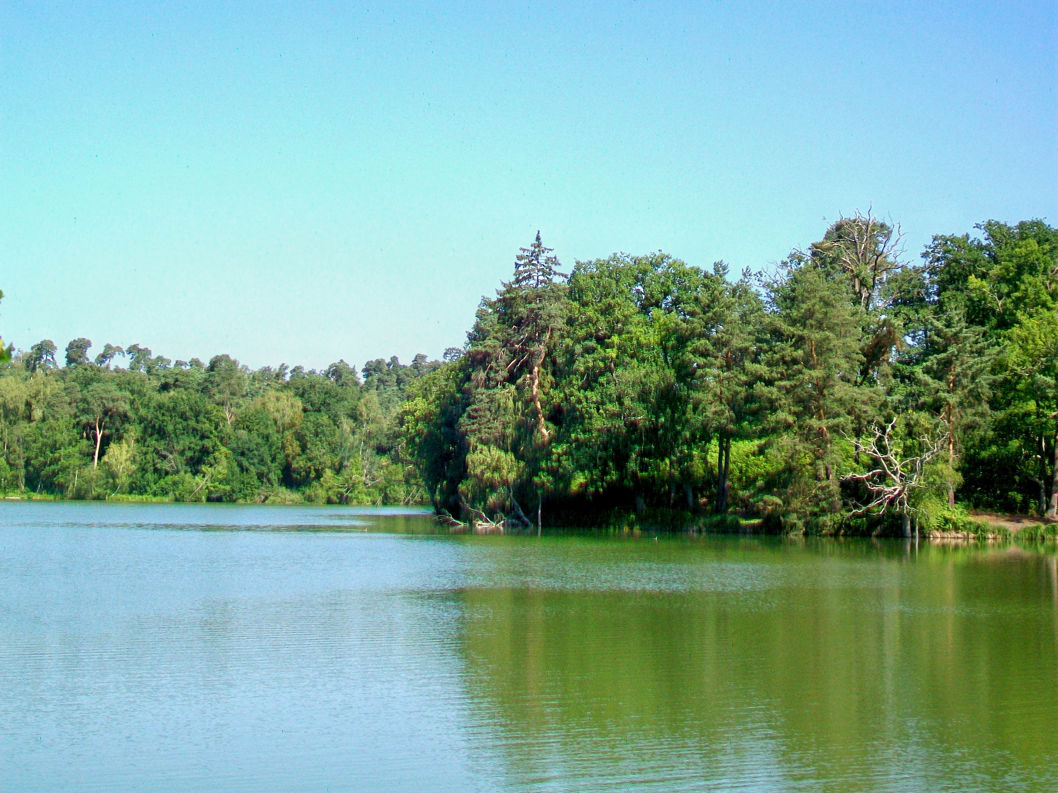 L'étang du Désert avec la presqu'île où se situait la cabane du pêcheur, vu depuis la RN 330.